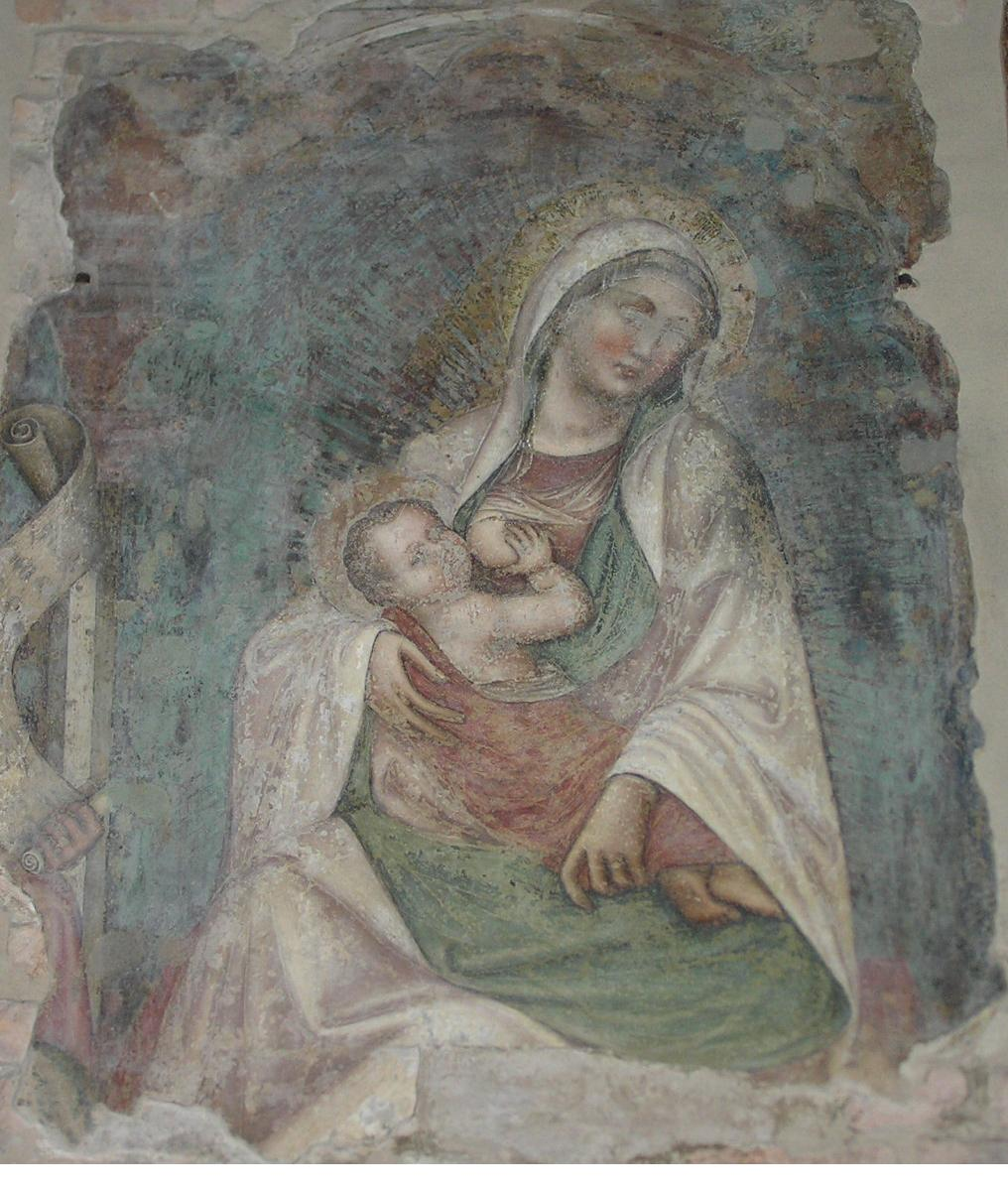 Madonna